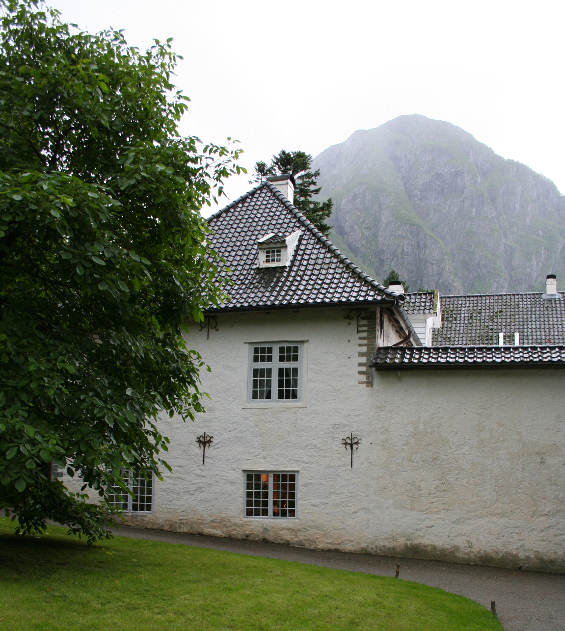 Rosendal, Schloss